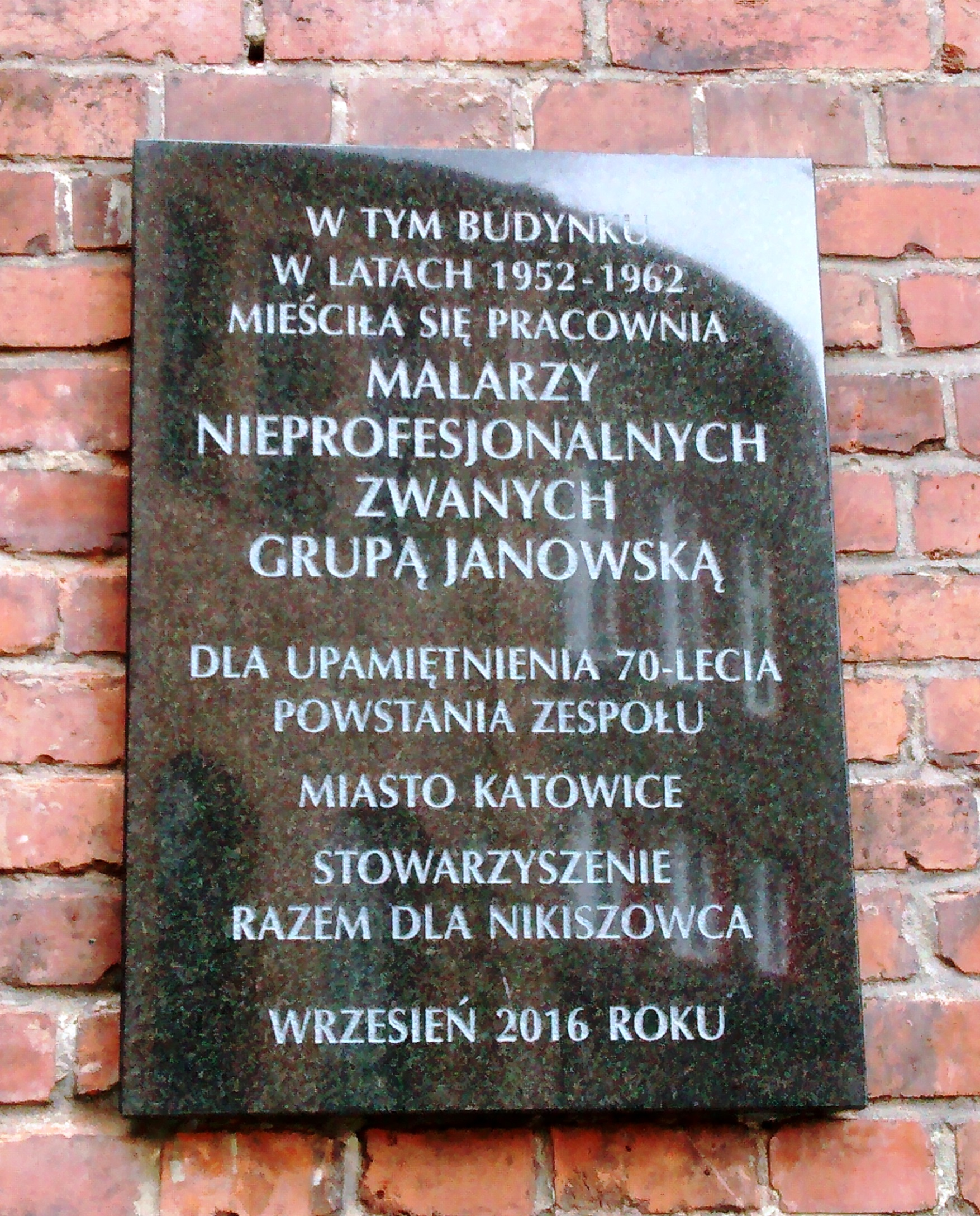 Tablica przy pl. Wyzwolenia 4 w Nikiszowcu, odsłonięta we wrześniu 2016 roku